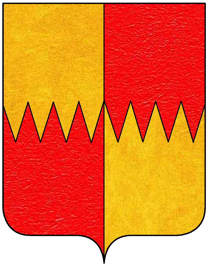 Stemma della famiglia Cinughi (Siena)